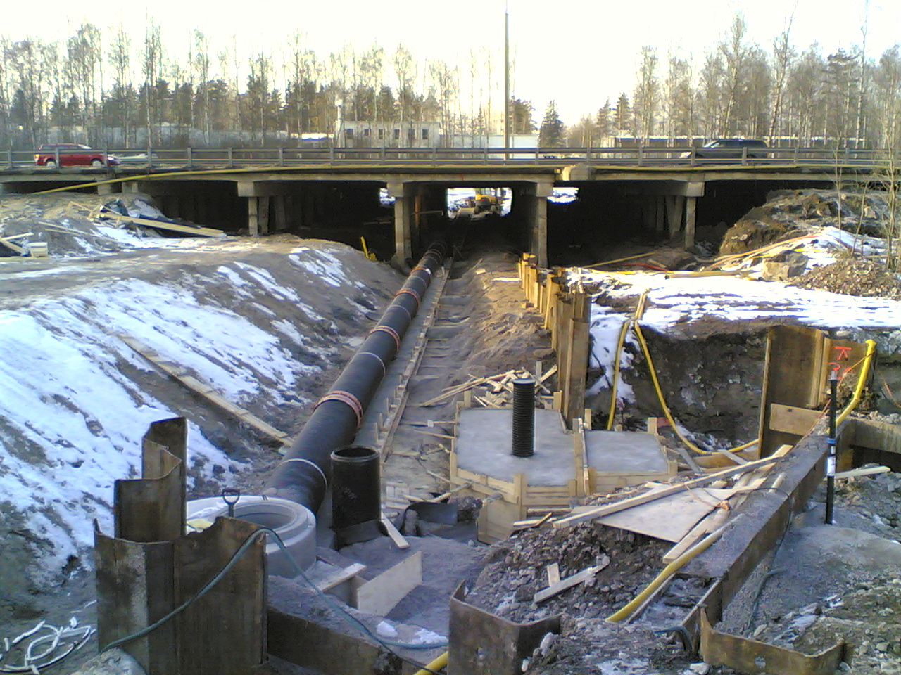 Kivikonlaita